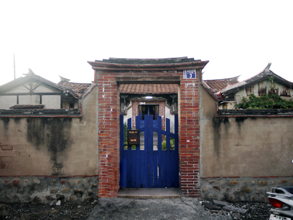 中文（台灣）: 清水社口楊宅。